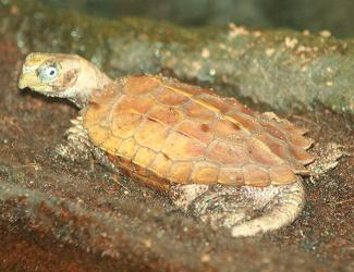 Geoemyda spengleri